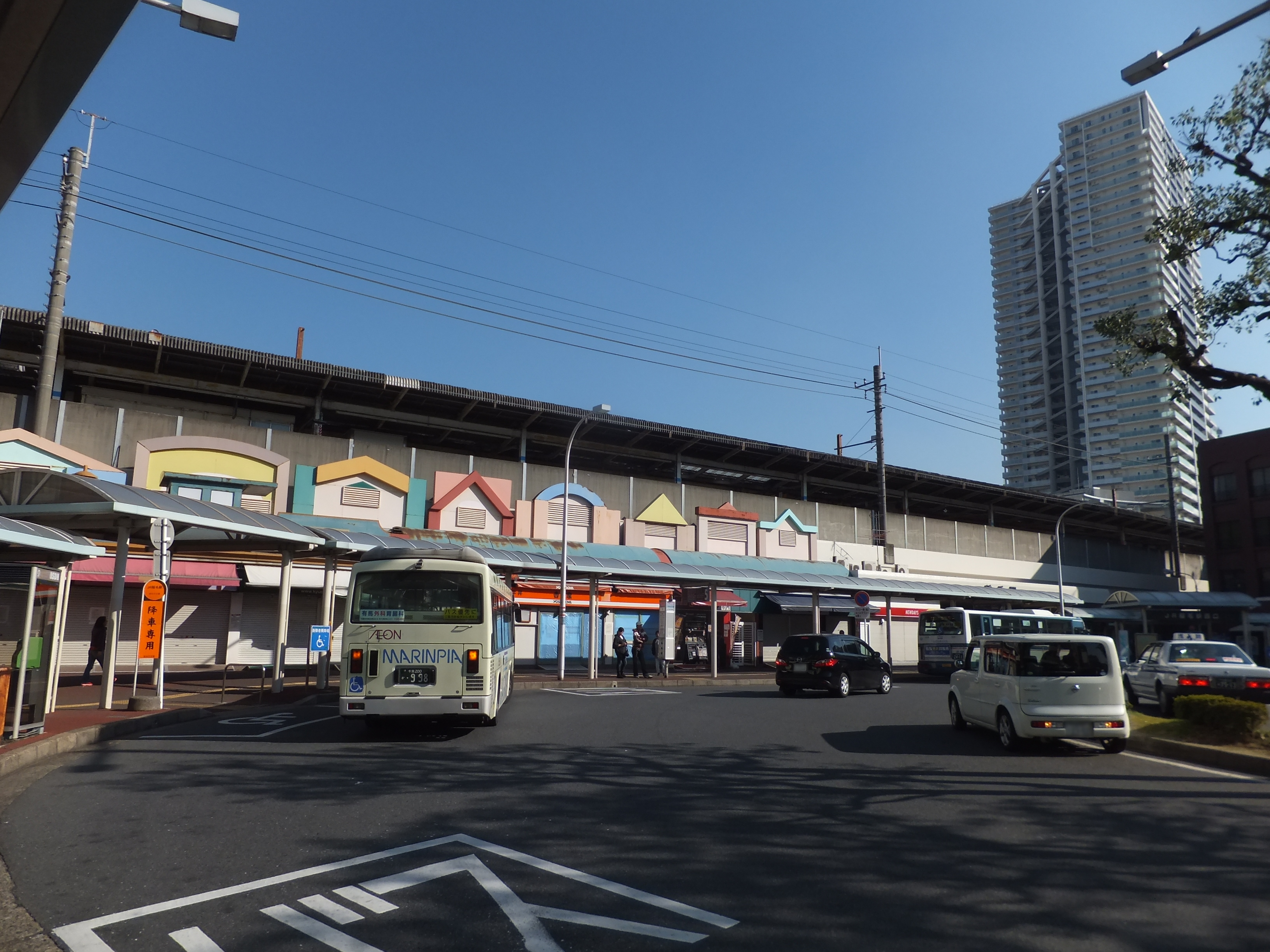 総武本線稲毛駅（千葉市稲毛区）、西口